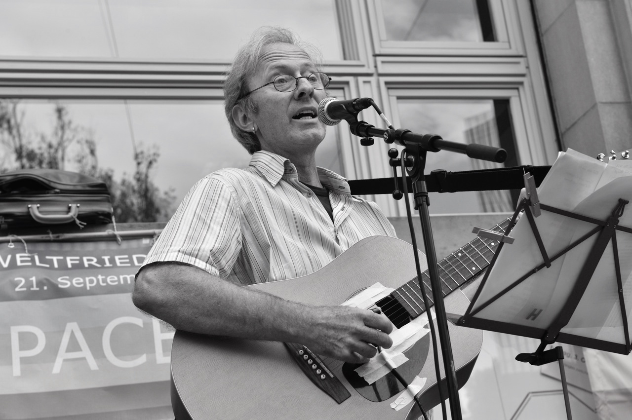 Hans Fässler an der Kundgebung zum "Internationalen Tag des Friedens" der UNO in St.Gallen